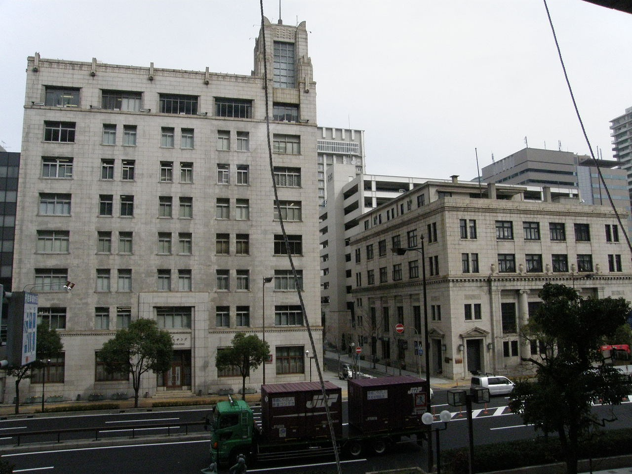 左は神港ビル（1939年竣工） 右はチャータードビル